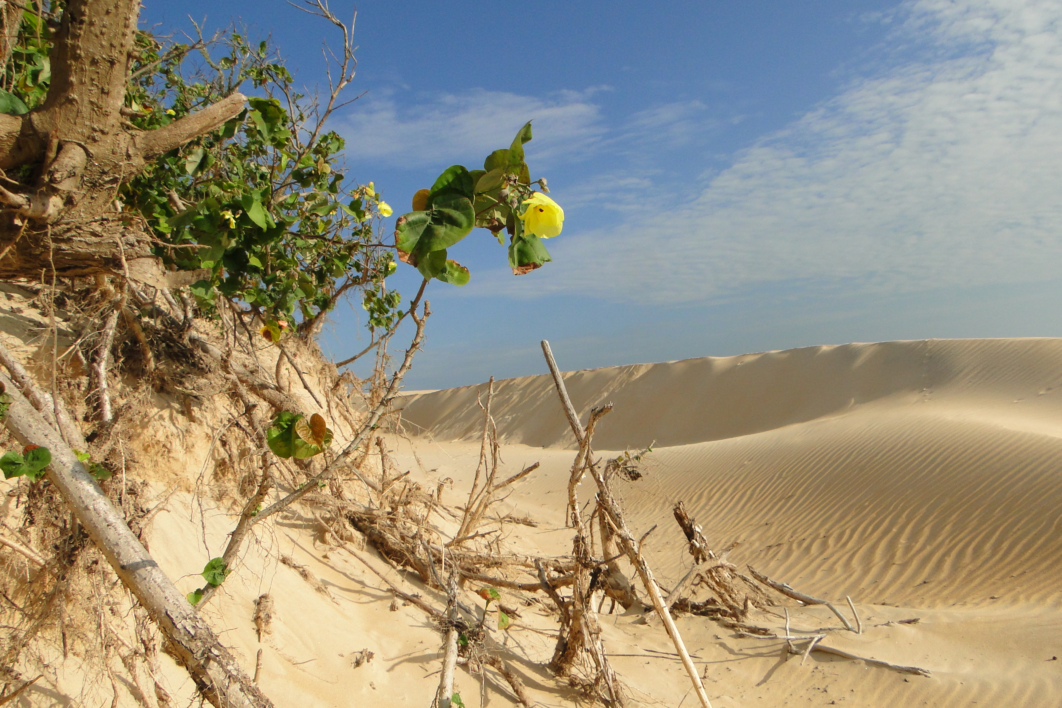 Paisagem Itaúnas E.S. Brazil